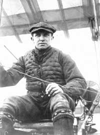 Fotografía de Jorge Chávez Dartnell que se encuentra en el Museo de la Aviación Mundial de París.